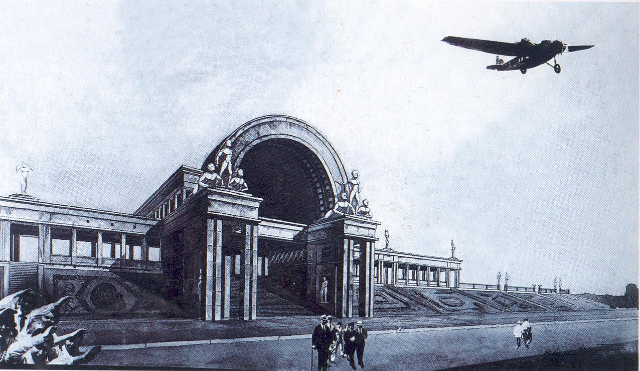 Изначальный проект павильона Уралмашзавода 1934 года